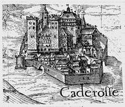 Dessin ancien de Caderousse